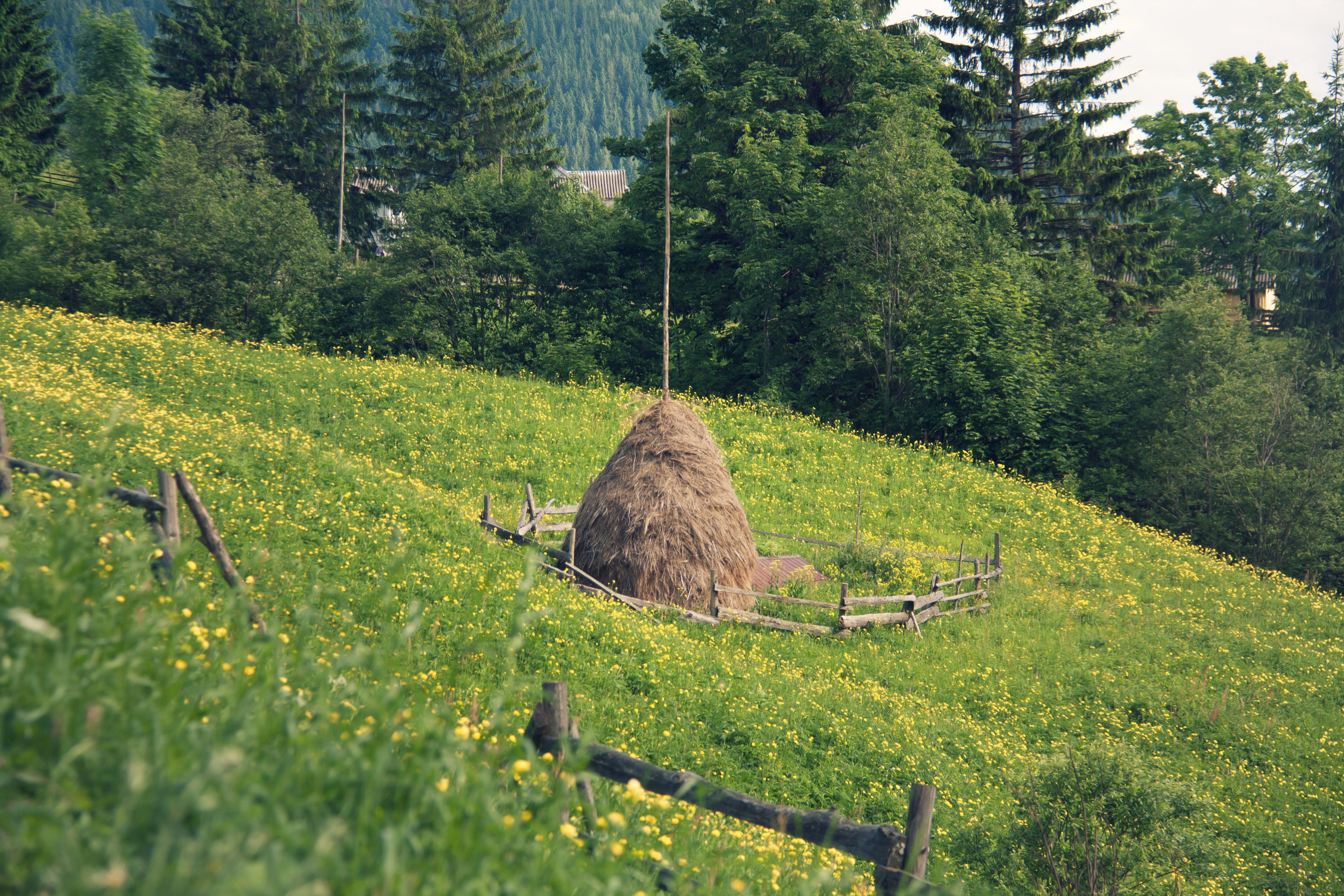 Hacina. Berezhnytsya, Ucrania